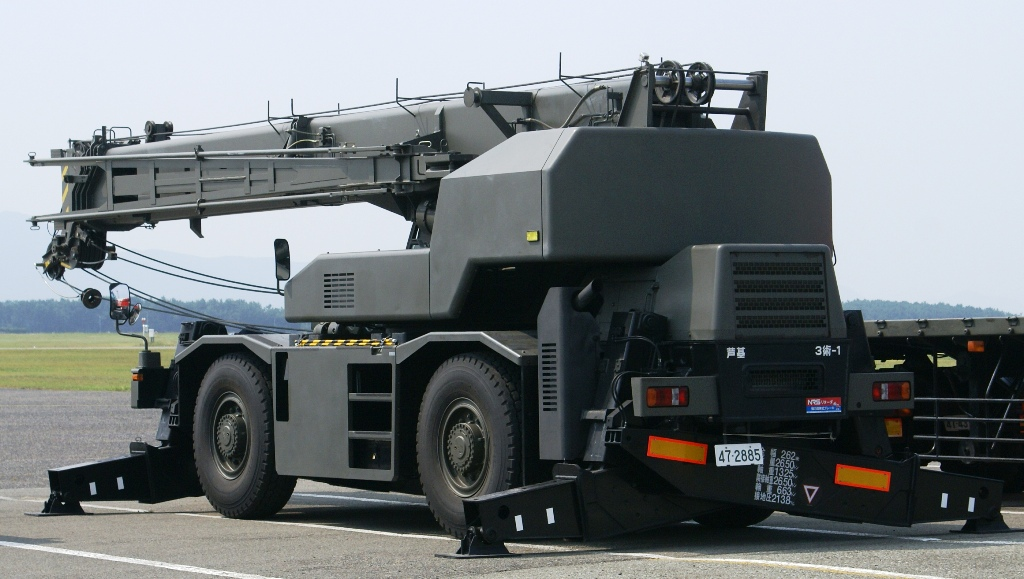 芦屋基地にて撮影